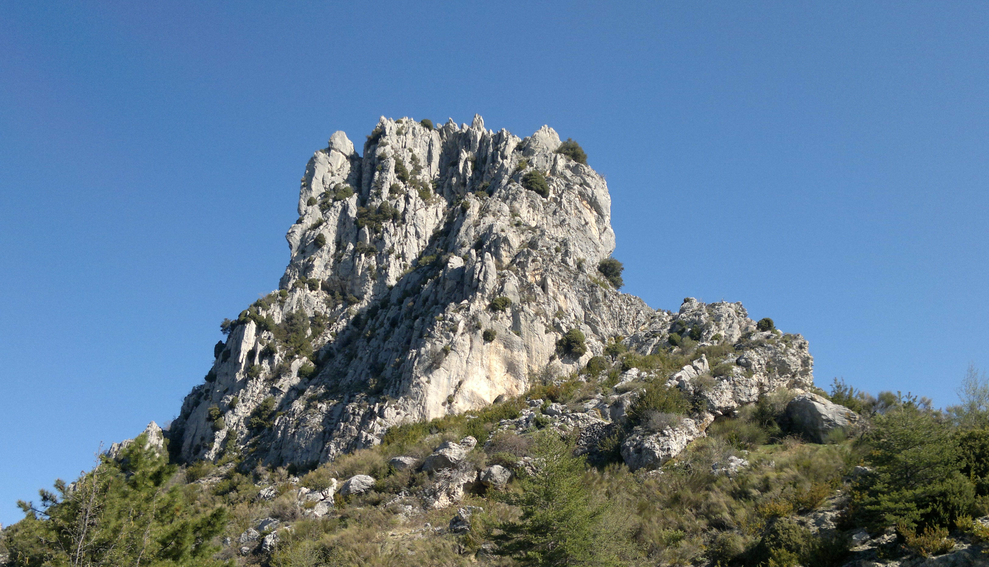 Duranus, France